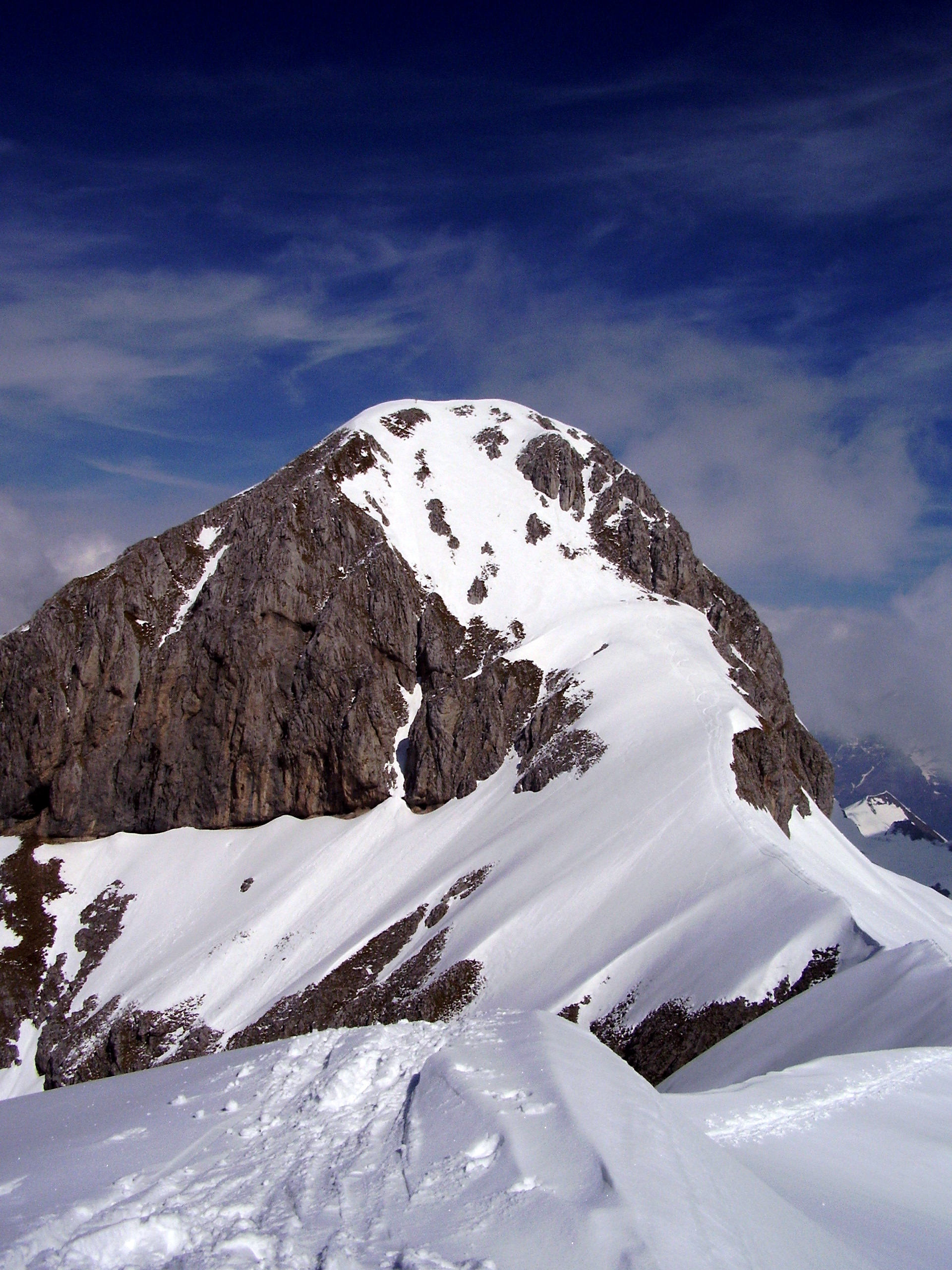 il ferrante visto dal ferrantino